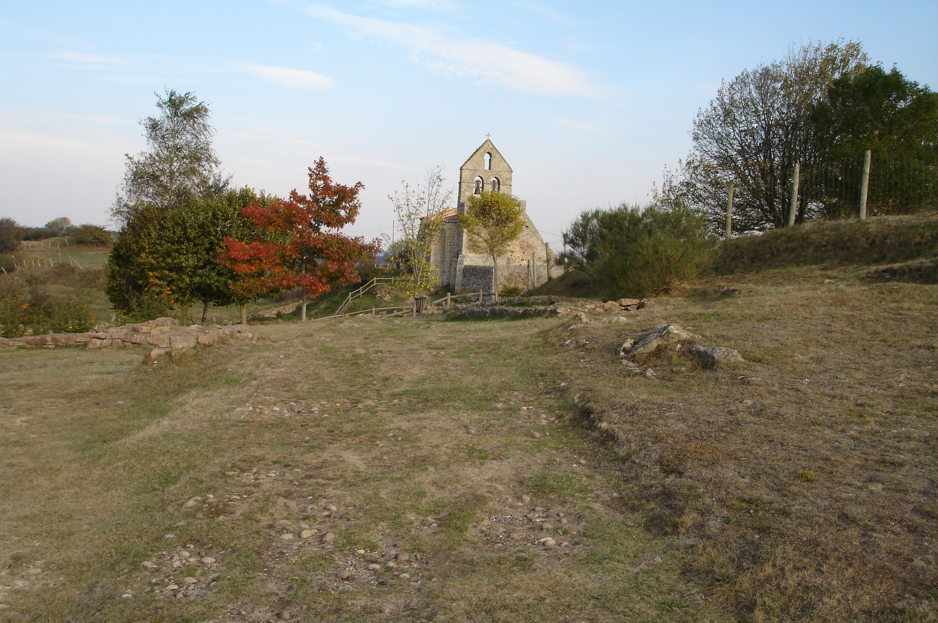 Detalle del empedrado del decumanus maximus a su paso por el barrio humilde de Julióbriga. Al fondo, la iglesia de Santa María de Retortillo.